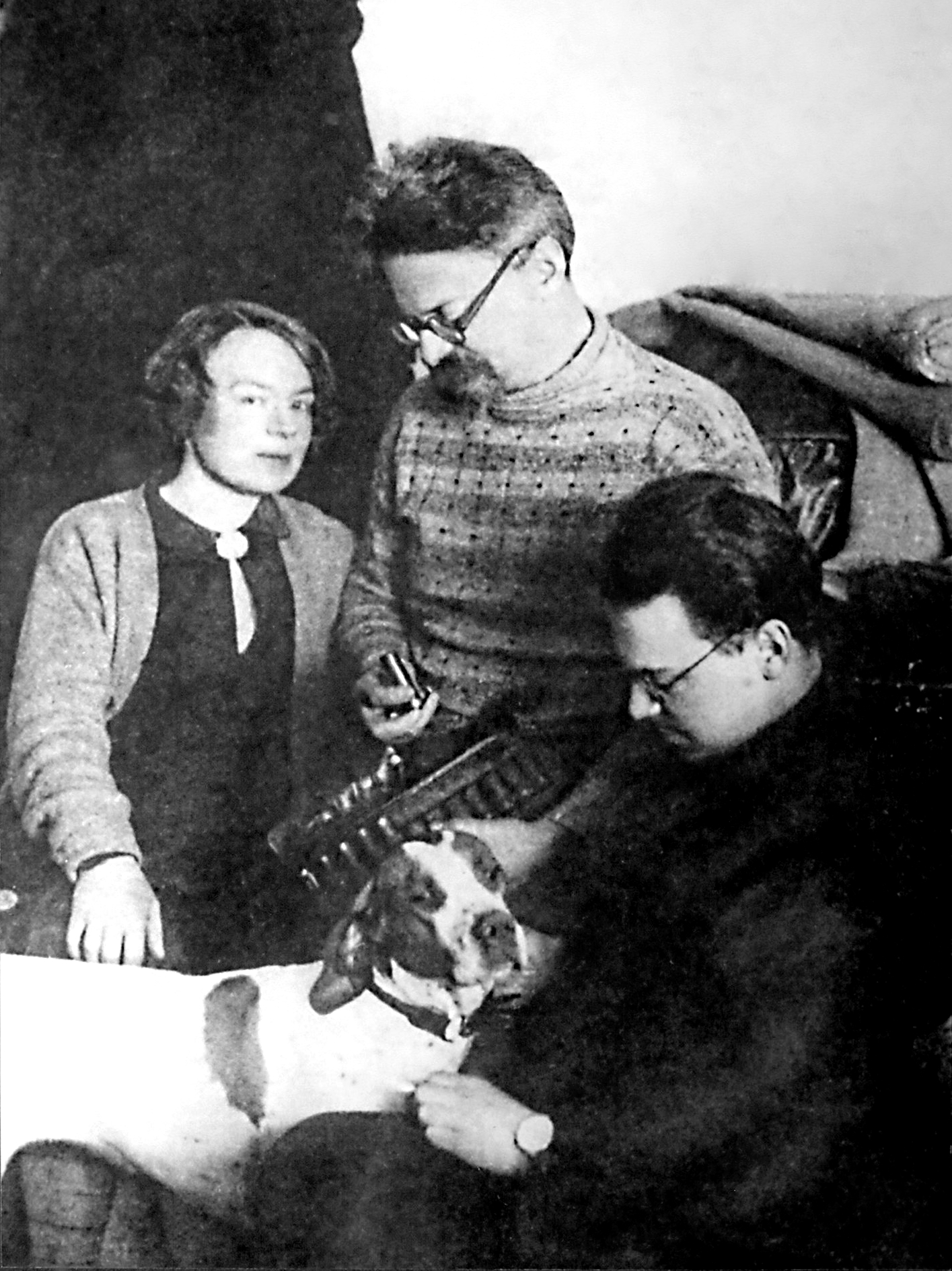 Léon Trotski, sa femme Natalia et leur fils Léon en exil à Alma-Ata